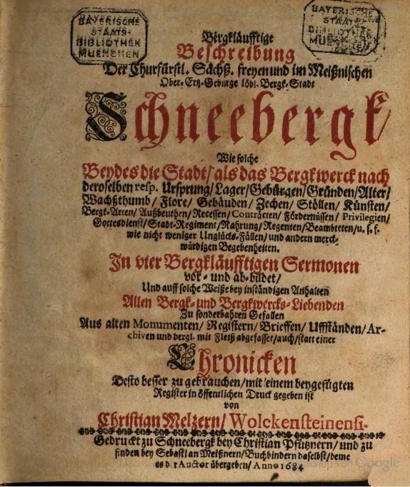 Schneeberg (Erzgebirge) Buchtitel von Christian Meltzer : Bergkläufftige Beschreibung Der Churfürstl. Sächß. freyen und im Meißnischen Ober-Ertz-Geburge löbl. Bergk-Stadt Schneebergk., Verlag Christian Pfützner, Schneeberg 1684 (Digitalisat in der Staats- und Universitätsbibliothek Dresden und Digitalisat ), letzteres abgerufen am 24. Februar 2015